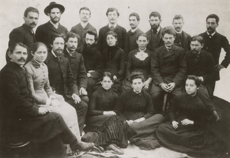 חברי קומונת אודסה החדשה. שימו לב ליחס המספרי בין גברים ונשים.